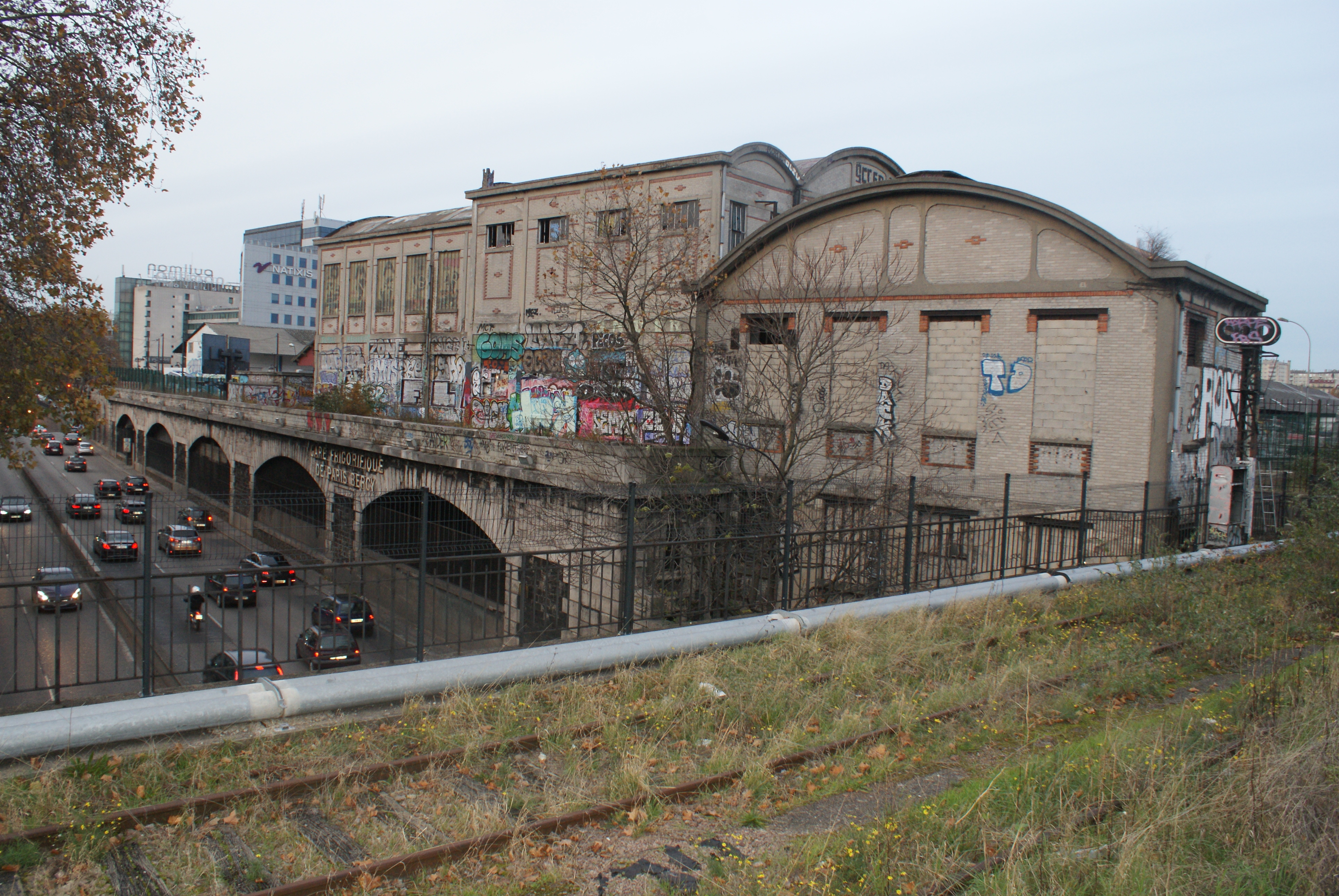 gare de La Rapée Inférieure, futur secteur Bercy-Charenton, en novembre 2016. Vue prise depuis le Pont National. Les voies ferrées au premier plan sont celles de la Petite Ceinture. L'usine électrique est également visible.